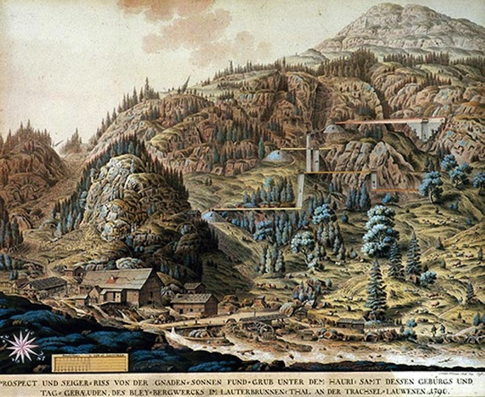 Prospect und Seiger-Riss von der Gnaden-Sonnen Fund-Grub unter dem Hauri, samt dessen Gebürgs und Tag-Gebæuden, des Bley-Bergwercks im Lauterbrunnen-Thal an der Trachsel-Lauwenen 1790.